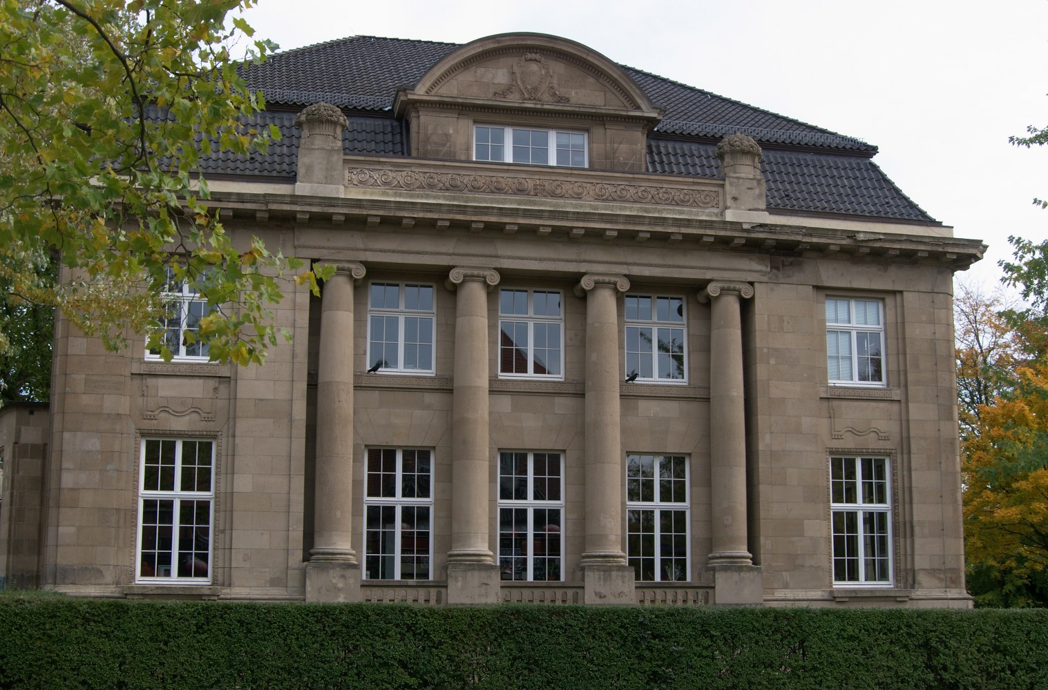 ehemalige Ballin-Villa in der Feldbrunnenstraße 58 nach Plänen von Lundt und Kallmorgen; heute Sitz des Unesco-Instituts für Lifelong Learning. This is a photograph of an architectural monument.